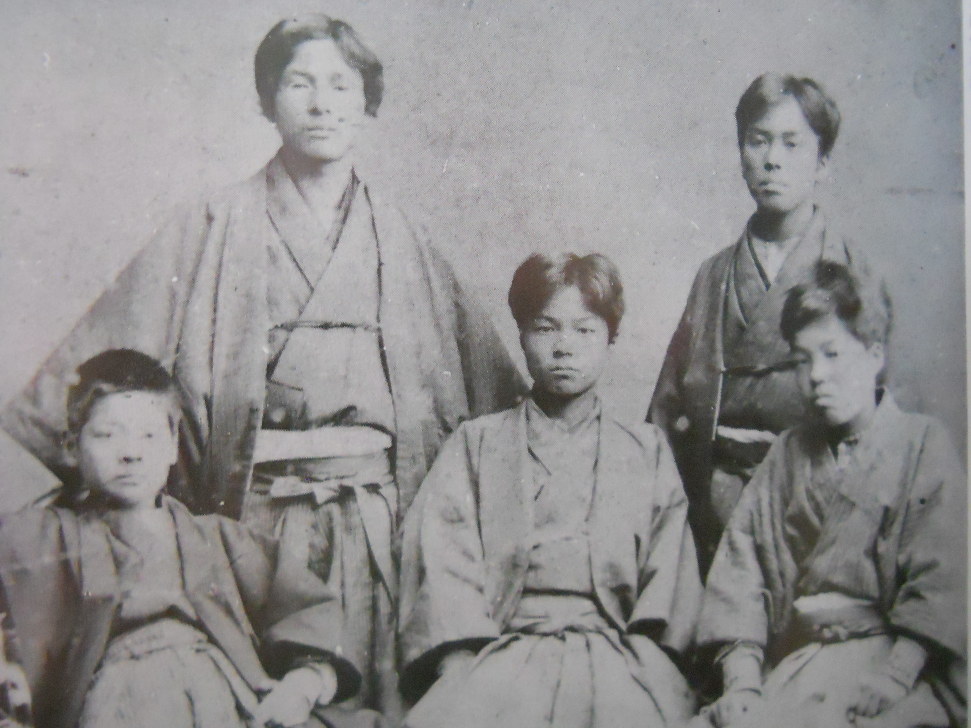 東京府芝区新橋での記念写真。前列右端が正岡子規、同左端が藤野潔